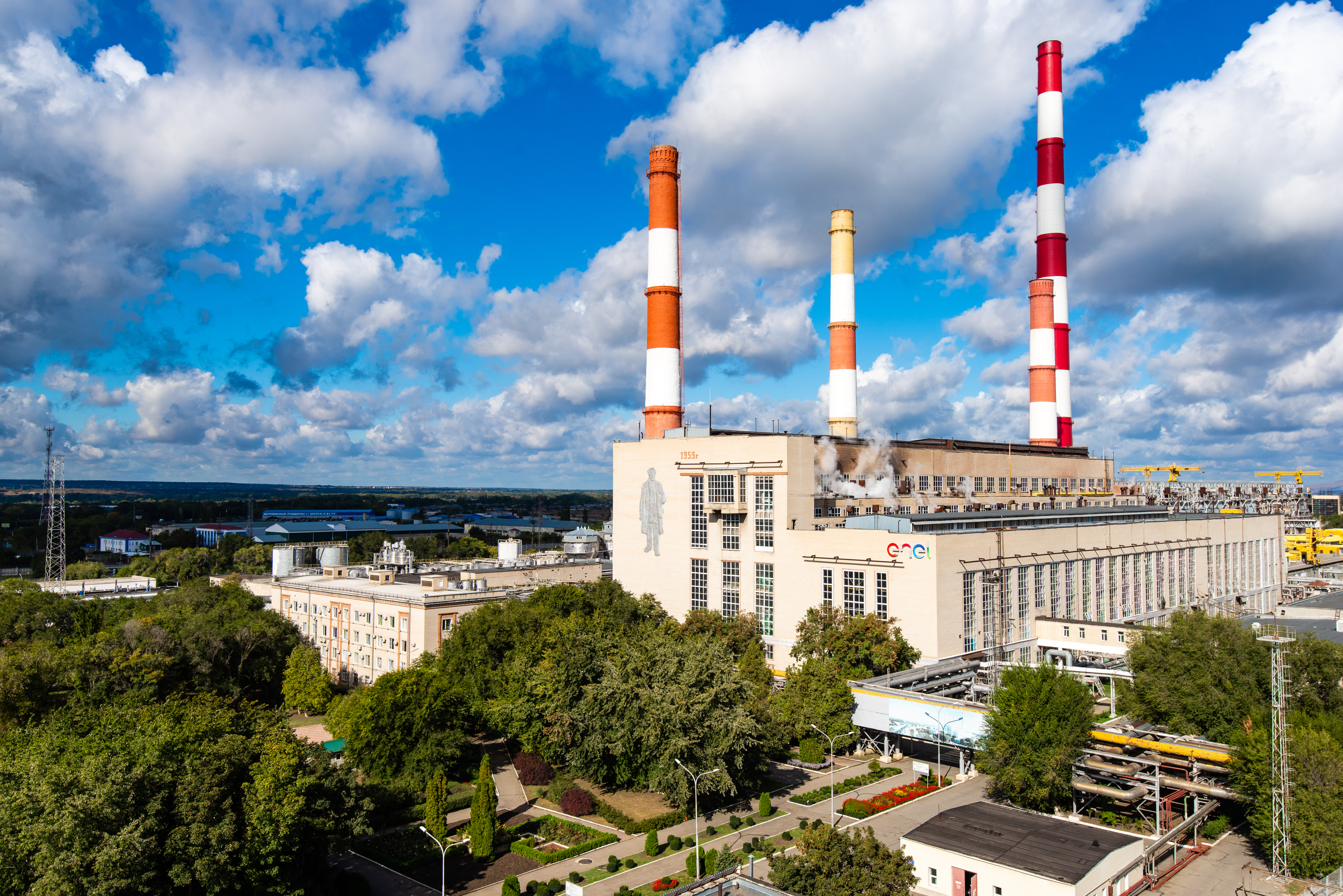 Изображение Невинномысской ГРЭС